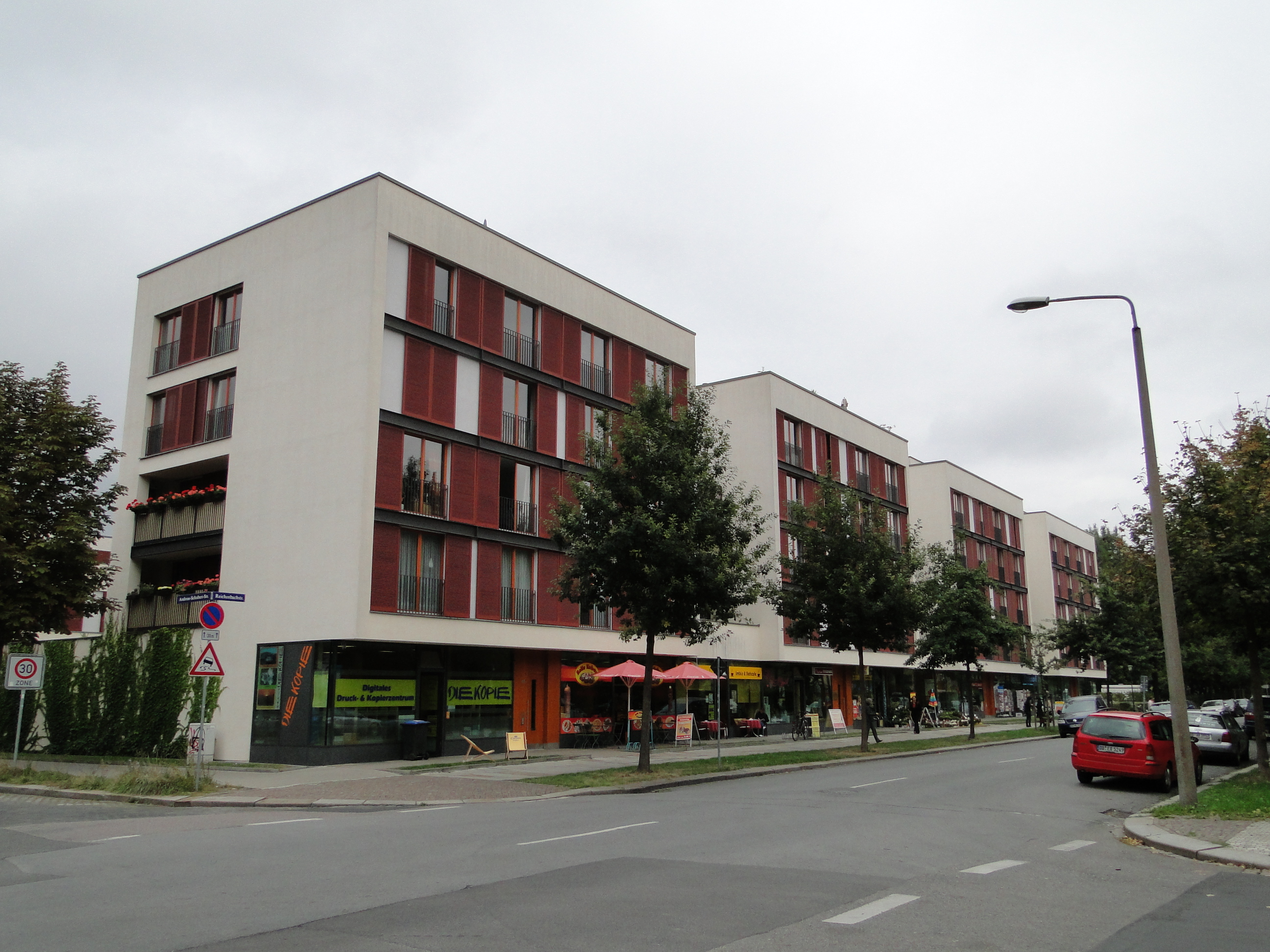 Stadthäuser im Lukasareal mit Ladenpassage (Reichenbachstraße/Andreas-Schubert-Straße)